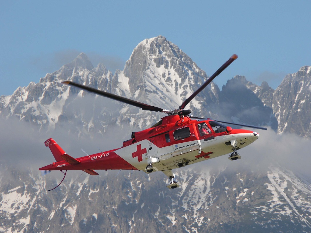 Agusta A109K2 Vysoké Tatry Slovakia